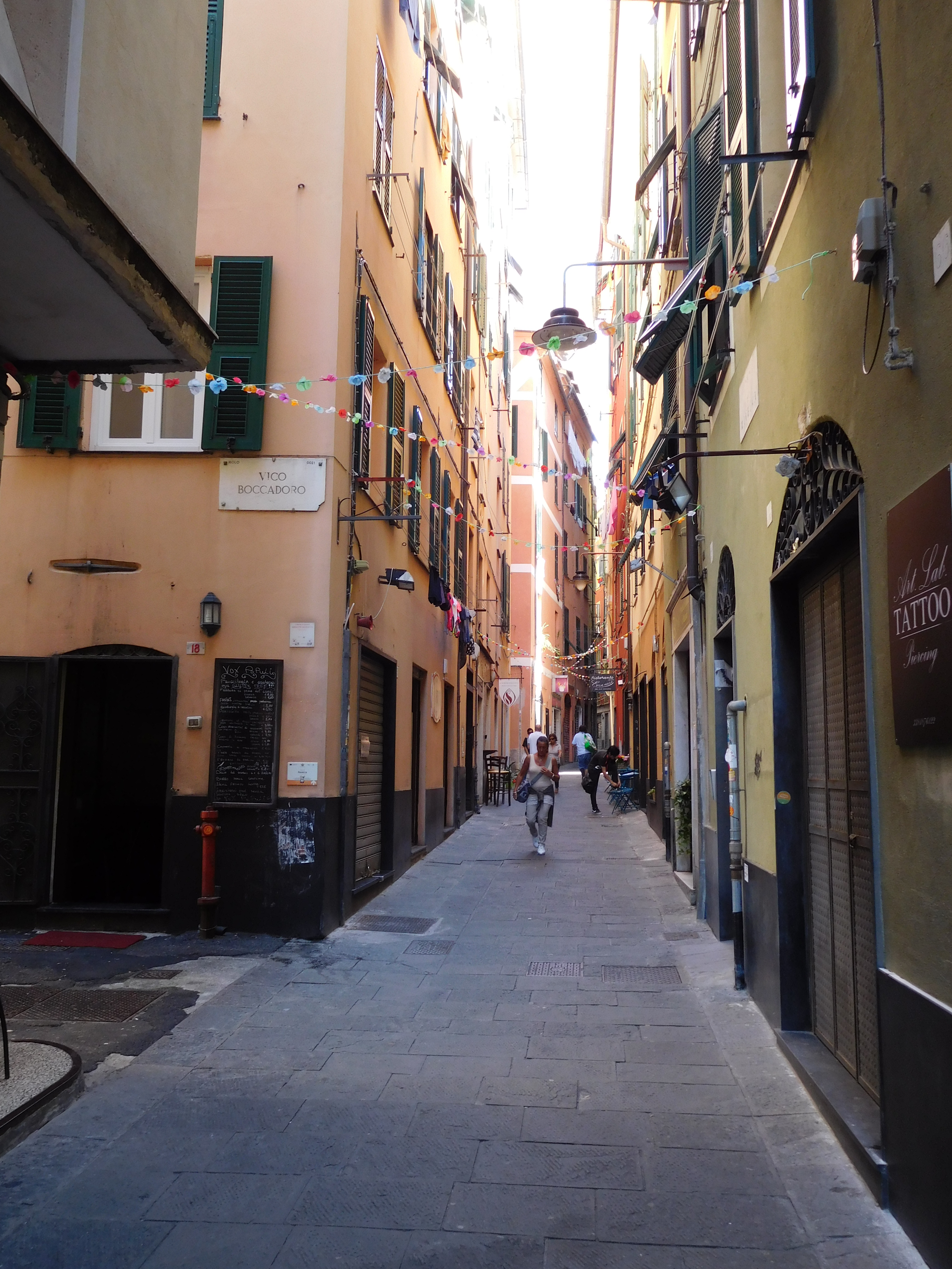 Via di Ravecca, Genova